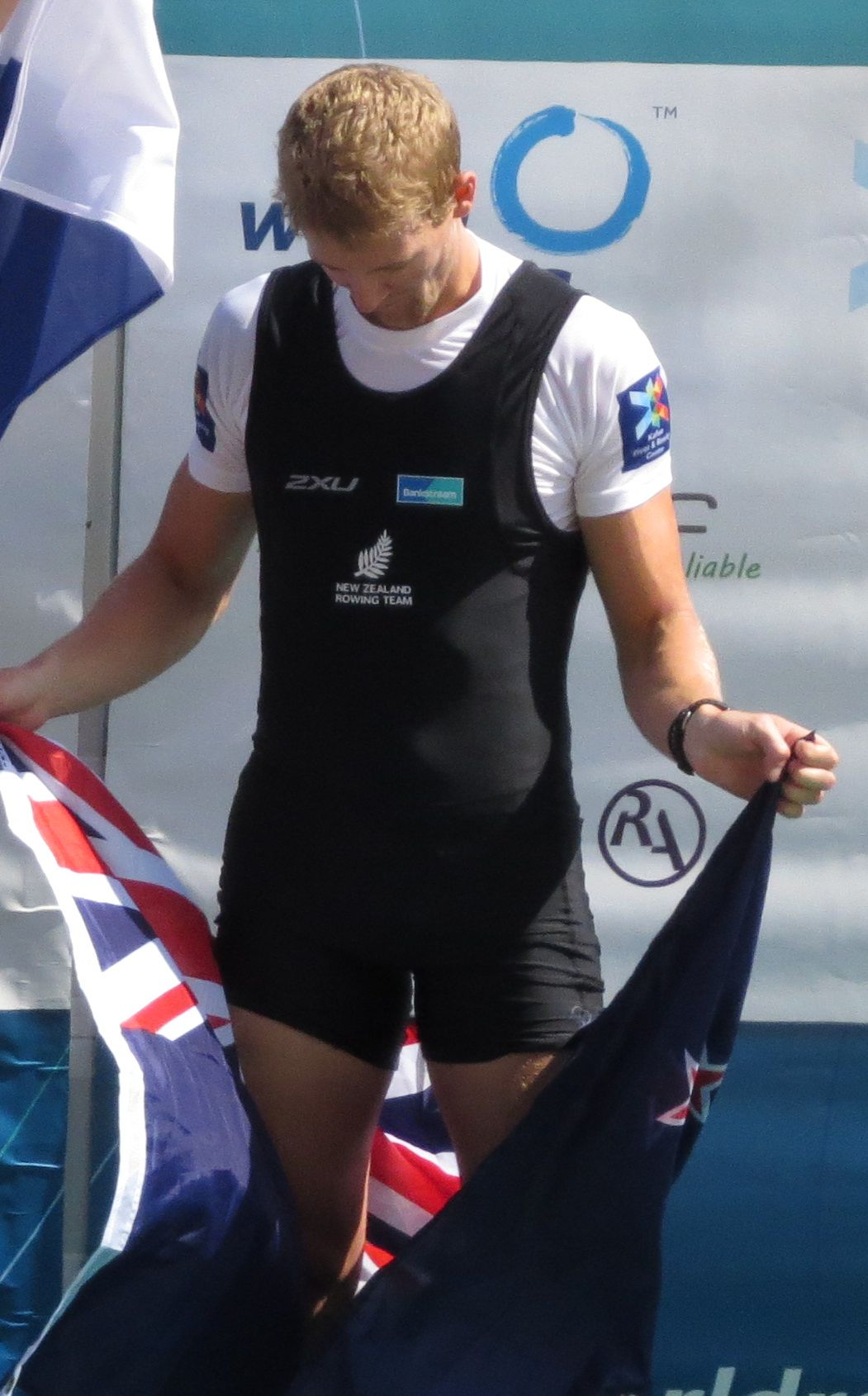 Podium LM1x: Adam Ling